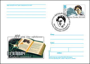 Почтовая карточка Беларуси с оригинальной маркой, посвященная 100-летию со дня рождения Платона Головача (1903-1937).